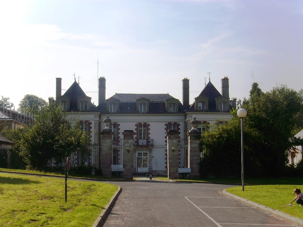 Château du Grand Mesnil, Bures-sur-Yvette